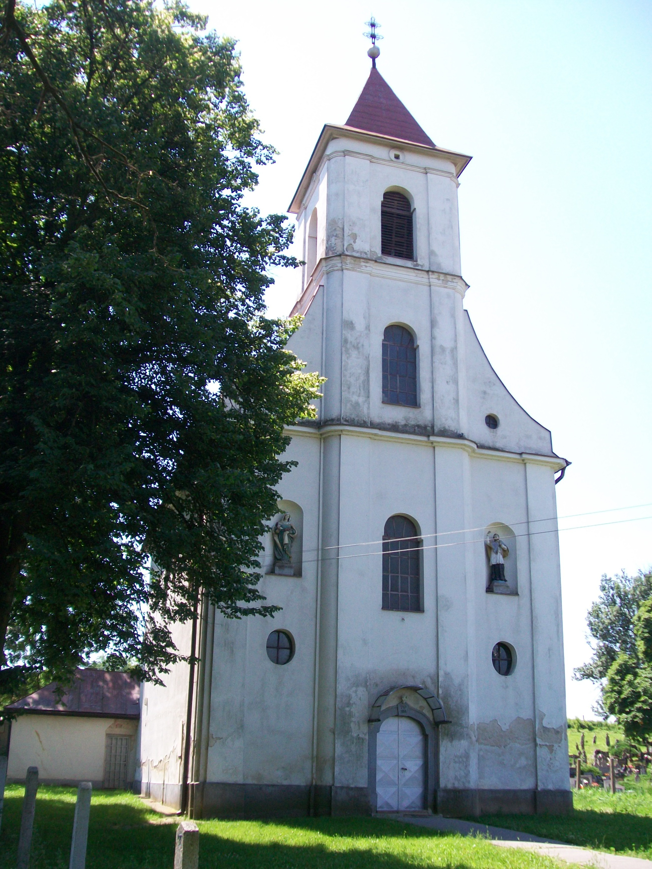 Barokový kostol sv. Martina biskupa - pochádza z roku 1764. Prestavaný bol v roku 1854 a 1895.